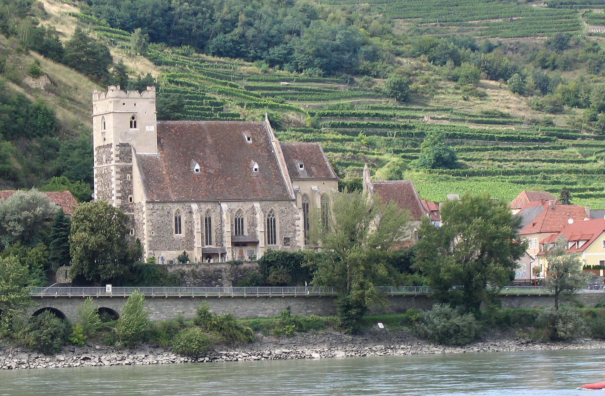 Austria, Sankt Michael in der Wachau, about 1500.